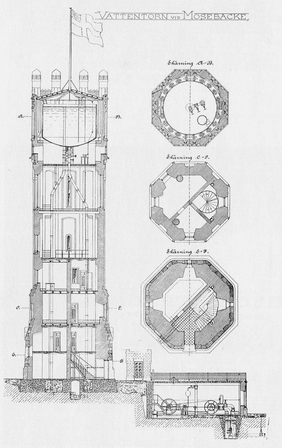 Mosebacke vattentorn, arkitektritning av Ferdinand Boberg